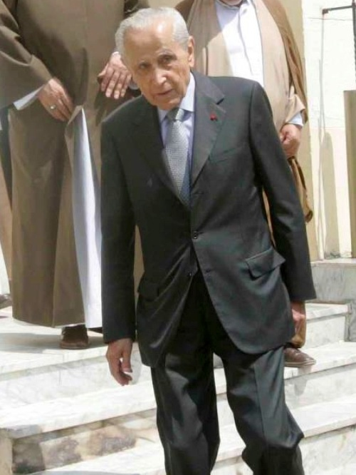 نائب في البرلمان اللبناني، من مواليد 1932